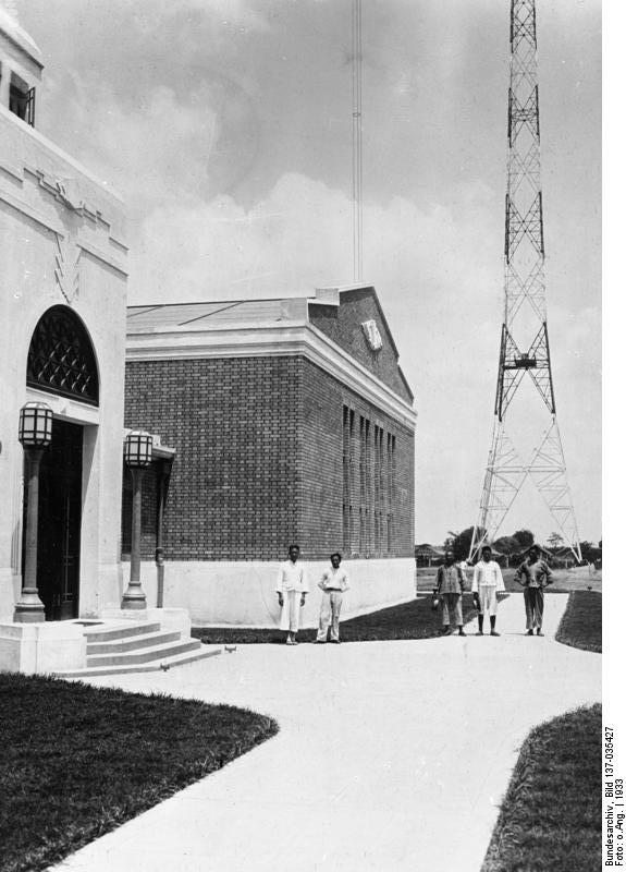 China, Nanking, Rundfunksender China, Nanking, Chinas grösster Rundfunksender von der Telefunken AG erbaut